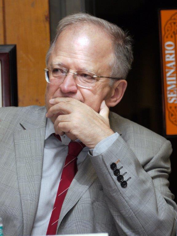 Poeta